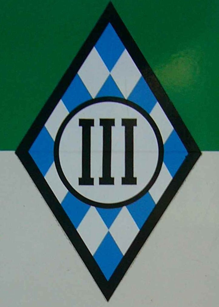 Taktisches Zeichen der III. BPA (Bayerische Bereitschaftspolizei)